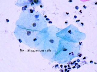 Normalne komórki nabłonkowe.